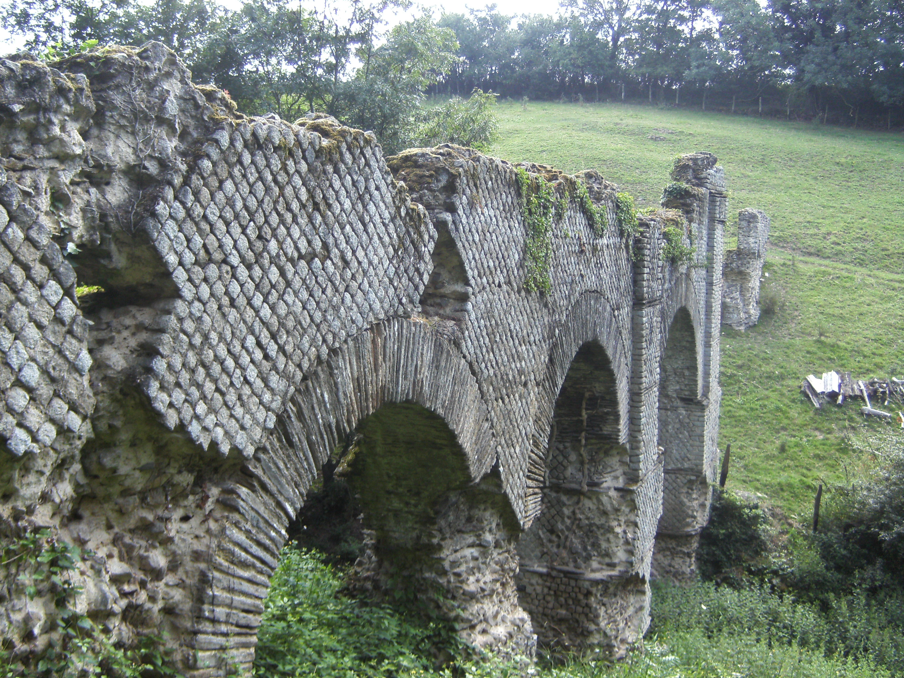 Aqueduc du Gier. Le pont des Granges à Saint-Maurice-sur-Dargoire.